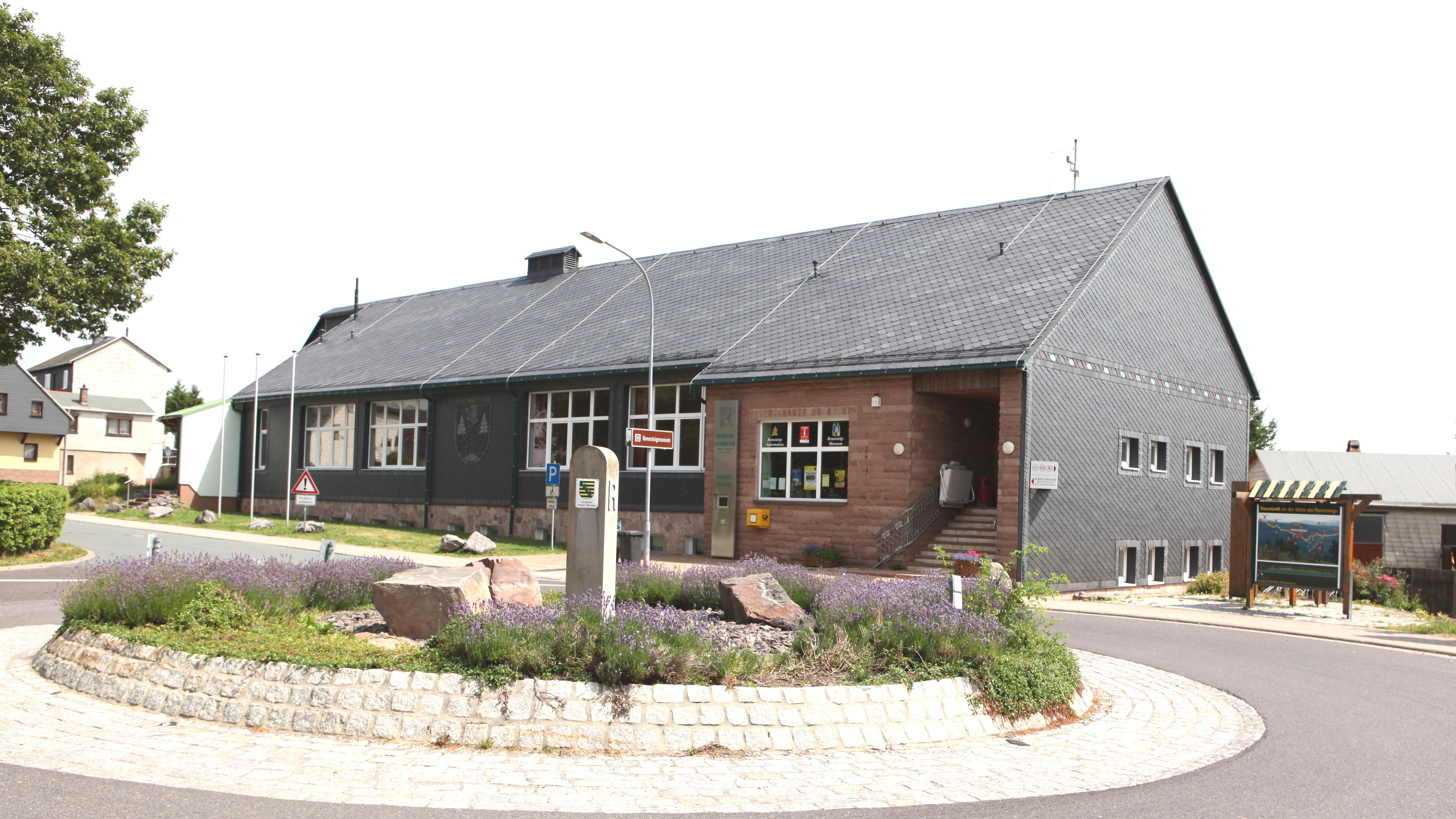 Gemeindezentrum und Rennsteigmuseum in Neustadt am Rennsteig